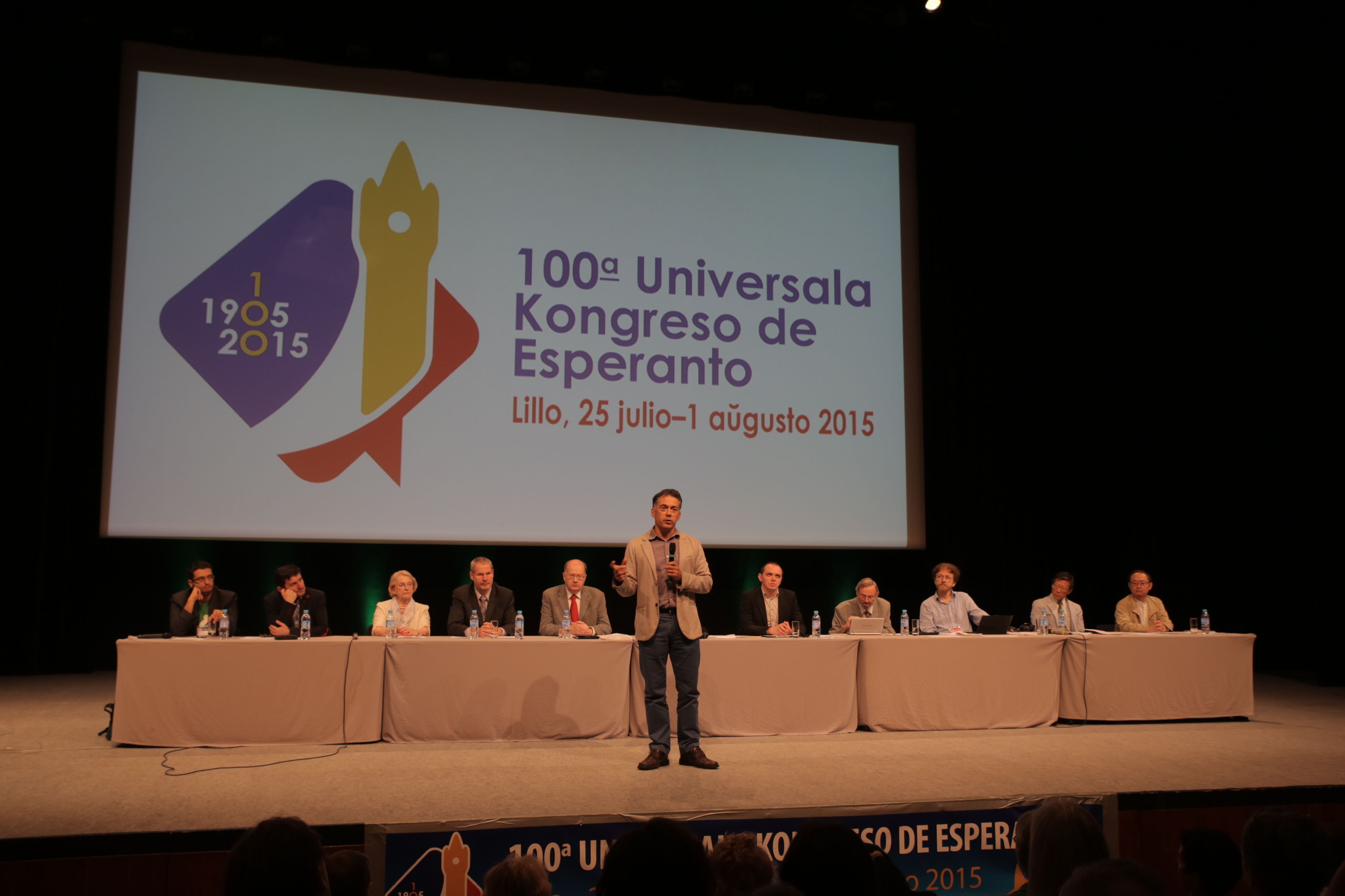 La solena fermo de la 100-a Universala Kongreso de Esperanto, kiu okazis de la 25-a de julio 2015 ĝis la 1-a de aŭgusto.